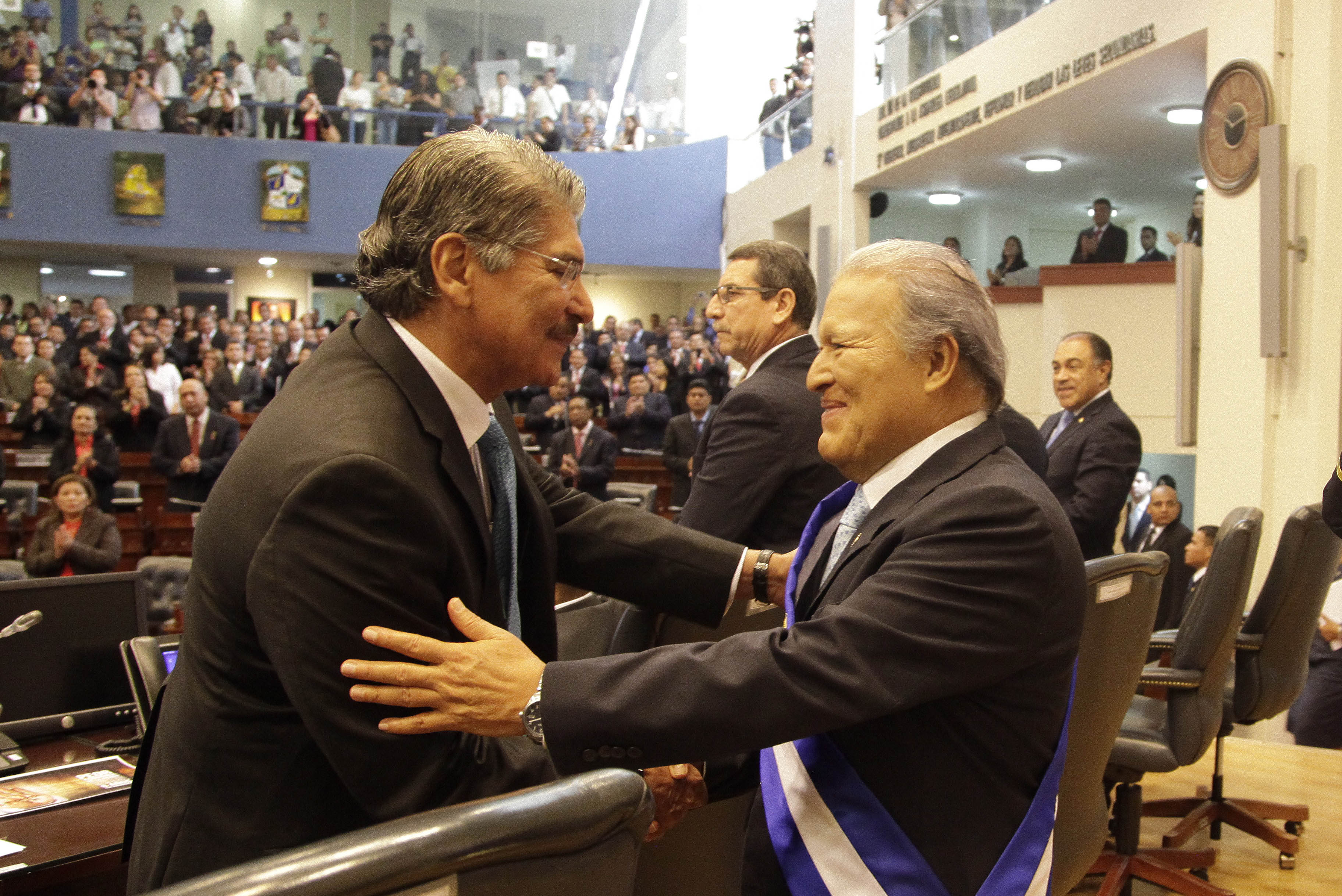 Norman Quijano,izq., saluda a Salvador Sánchez Cerén.